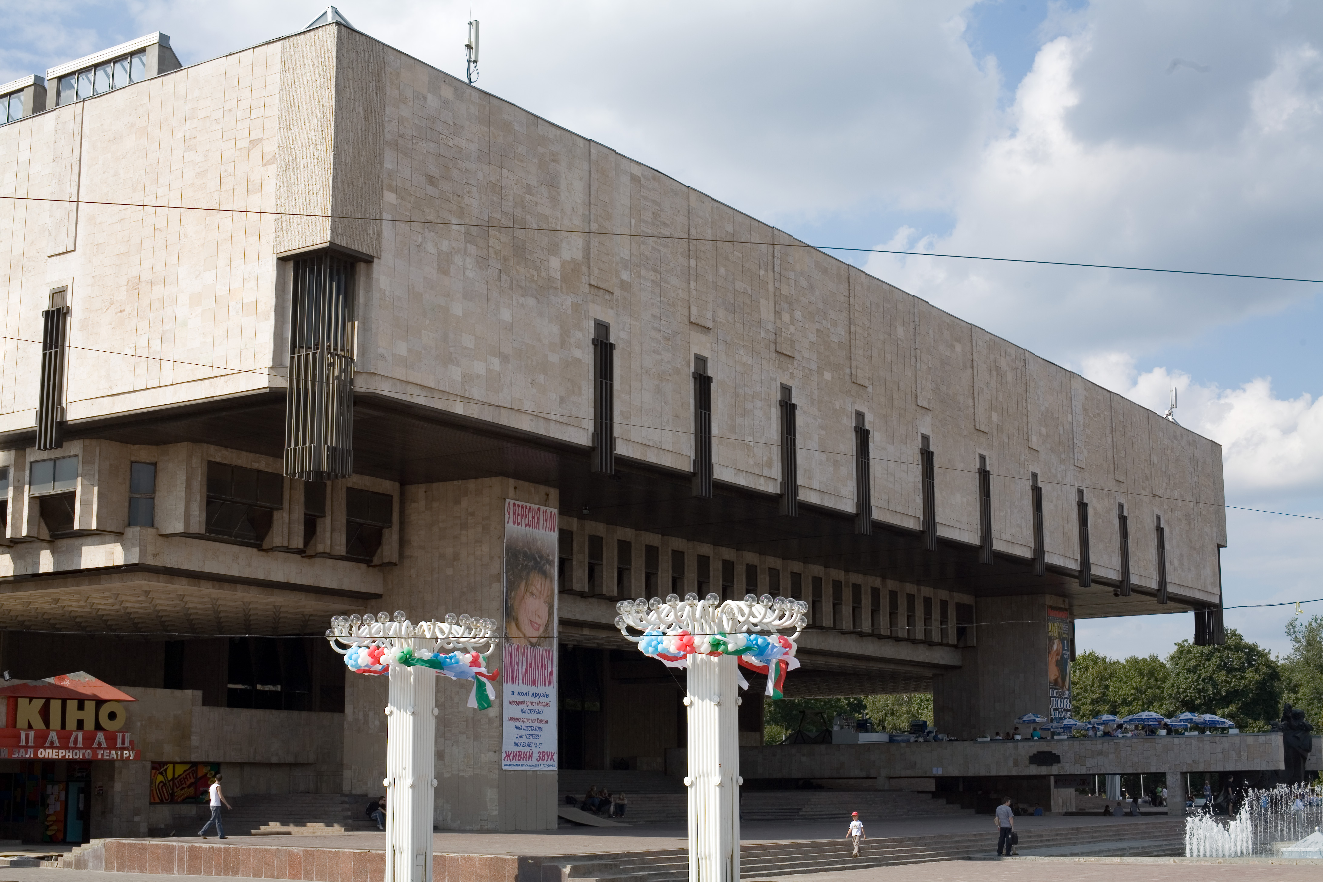 New Kharkov Opera Theater. Гл. архитектор Сергей Николаевич Миргородский, 1971-1986.